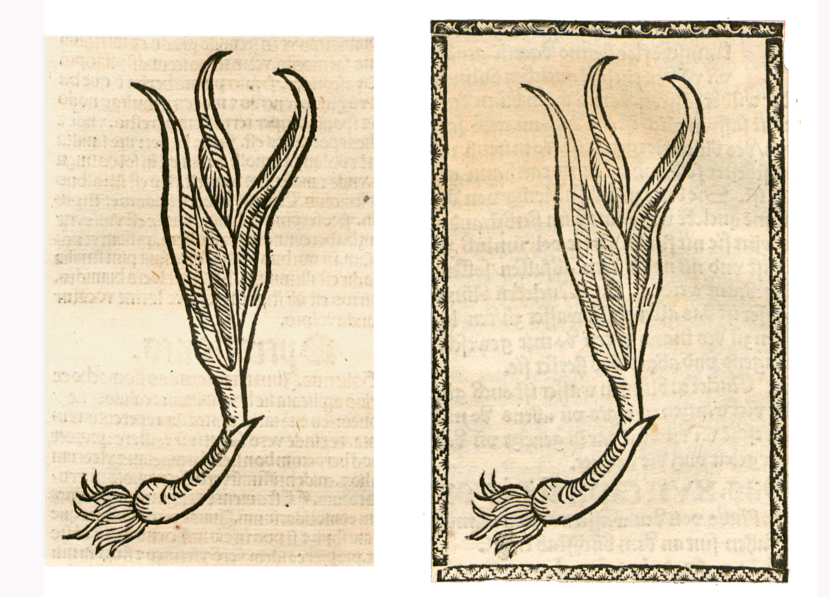 Abbildung von: Quelcken (Colchicum autumnale)